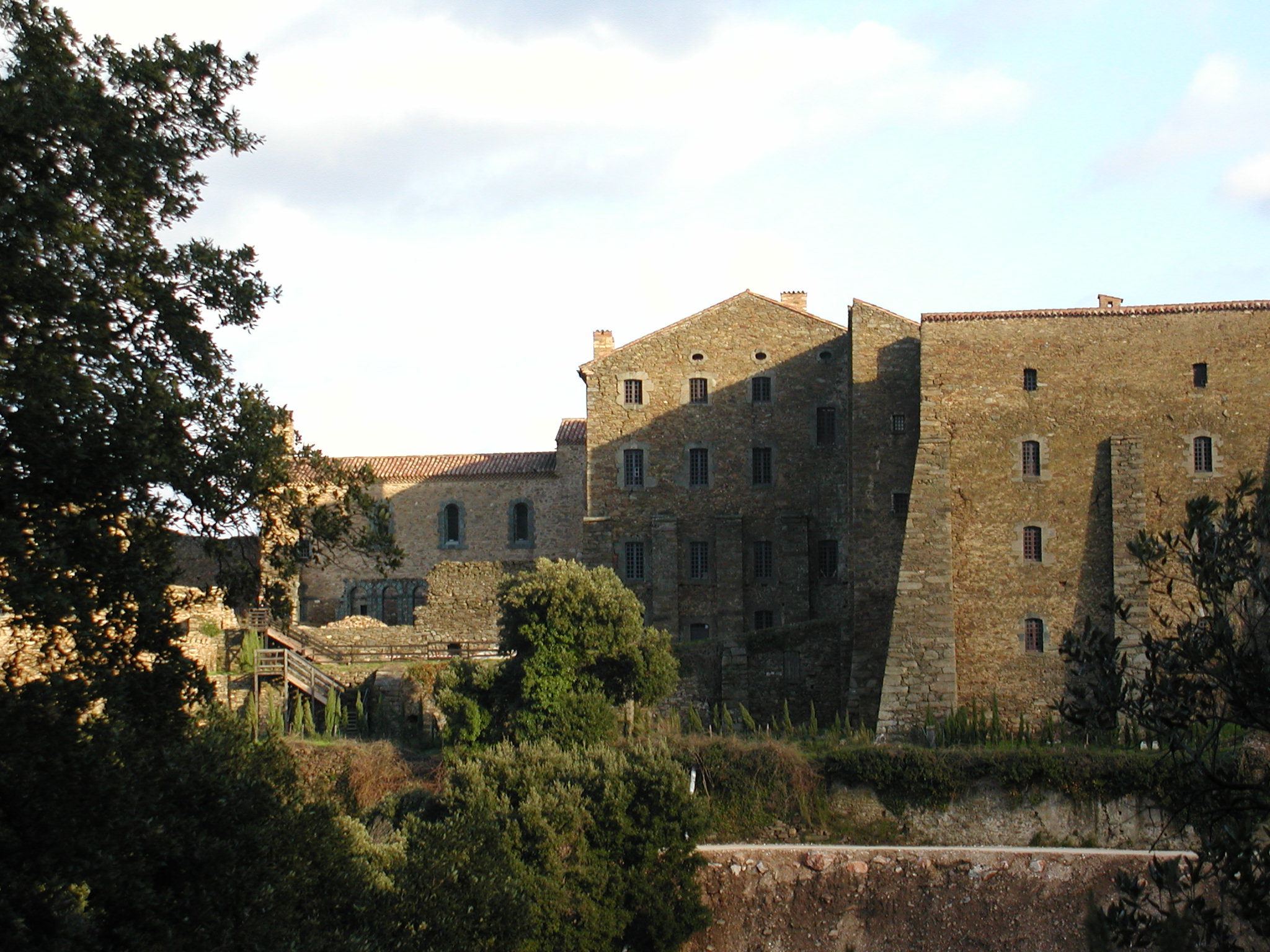 Chartreuse de la Verne - Exterior view